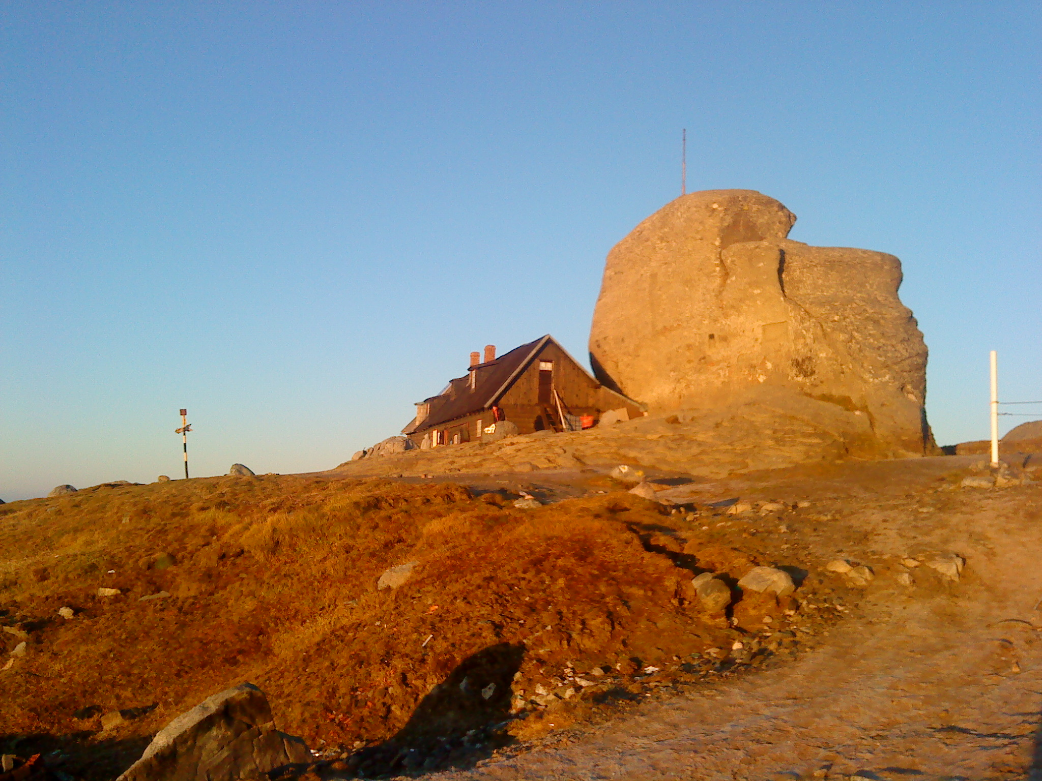 Varful si Cabana Omu, Muntii Bucegi. Septembrie 2009